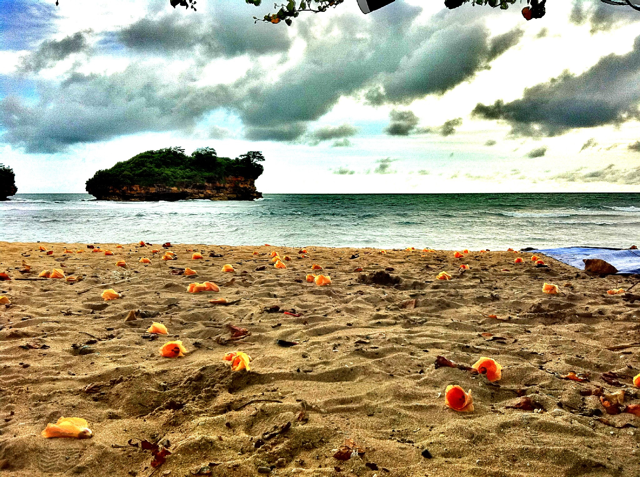 Pantai Teleng Ria adalah salah satu destinasi wisata yang populer di Kota 1001 Goa, Pacitan, Jawa Timur. Tidak hanya mendapati suguhan lanskap pantai yang indah jika dipandang dari perbukitan, Pantai Teleng Ria ini juga menjadi salah satu tempat bagi para peselancar pemula untuk belajar mengarungi ombak Samudera Hindia.